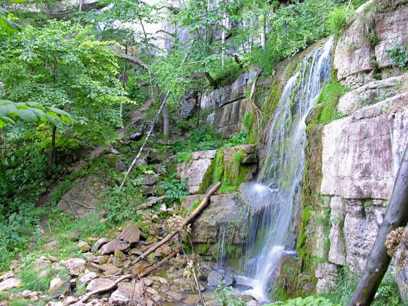 Башҡортса: Күперле шарлауығы